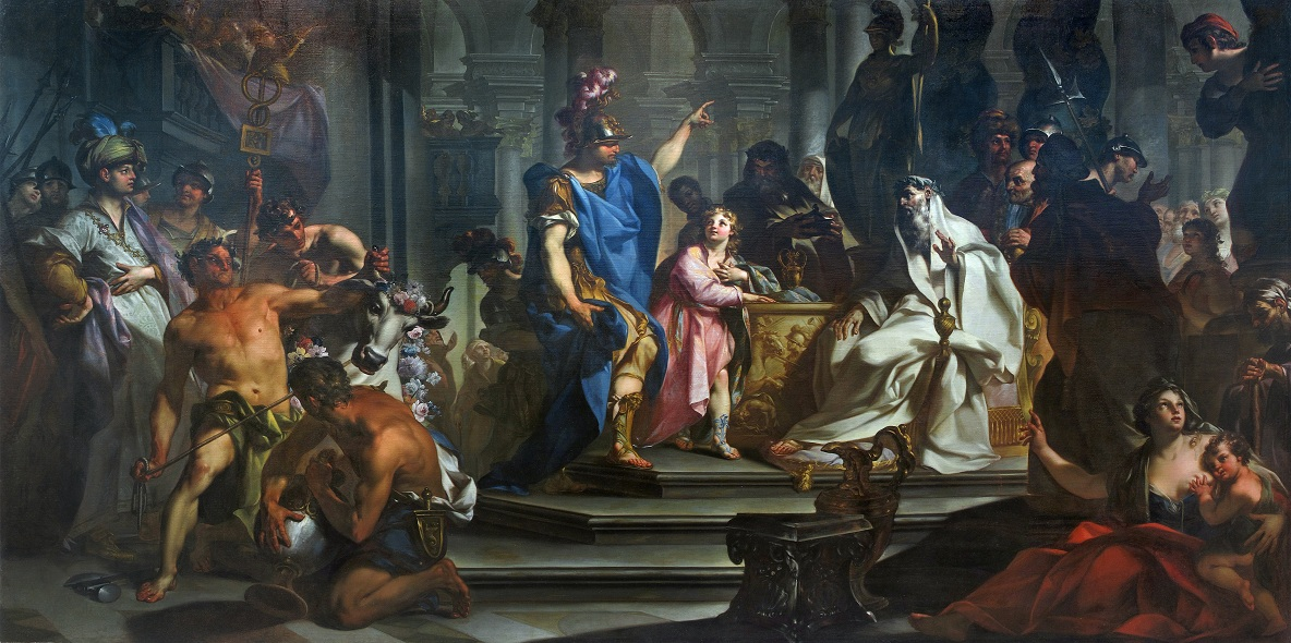 Hannibal jurant haine aux Romainstitle QS:P1476,fr:"Hannibal jurant haine aux Romains"